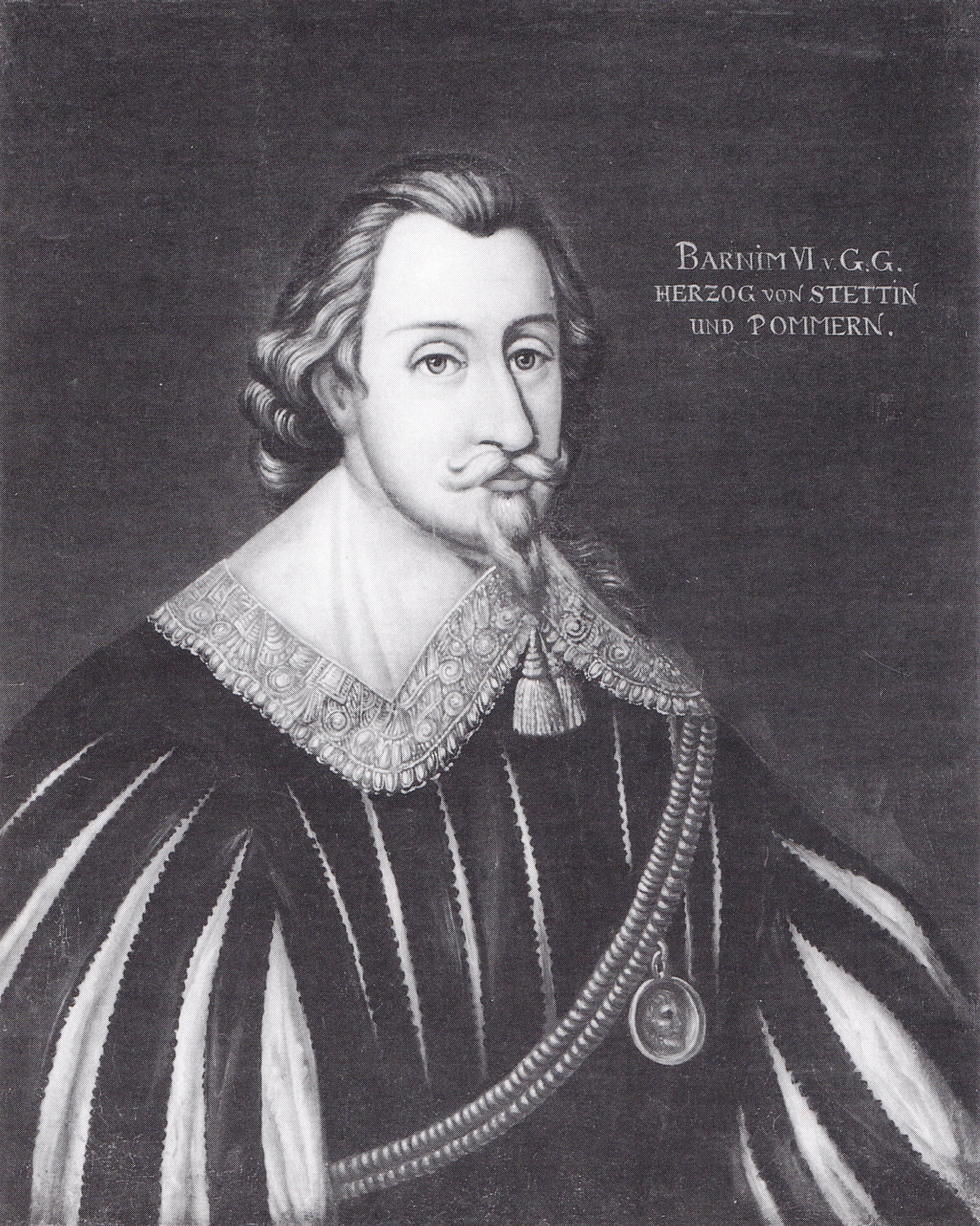 Ölgemälde von Herzog Bogislaw XIV. von Pommern, hier fälschlich als Barnim VI. bezeichnet; Zuordnung vgl. etwa Schmidt, Roderich: Das historische Pommern, Köln 2009, S. 197, 213.